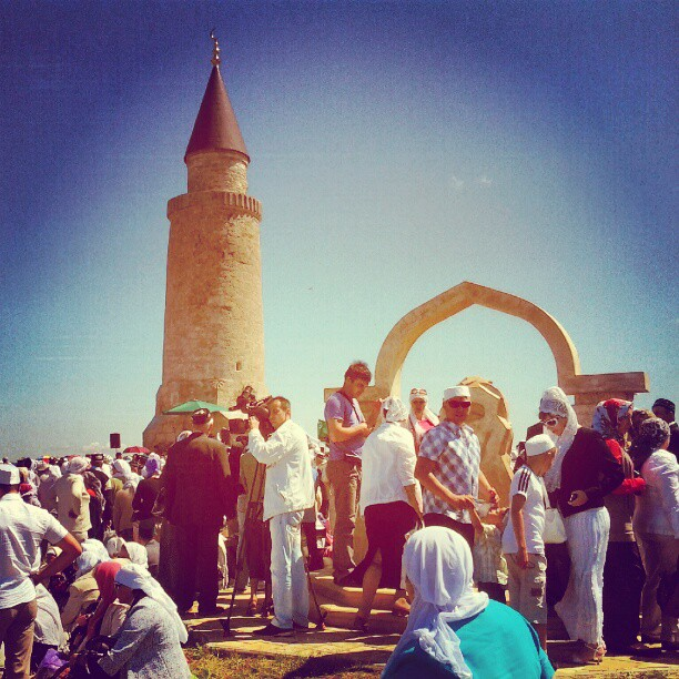 Комплекс памятников архитектуры XIII-XIV вв. на территории Булгарского городища (архитектурный комплекс «Болгары») (Республика Татарстан, Болгар, село Болгары, городище)